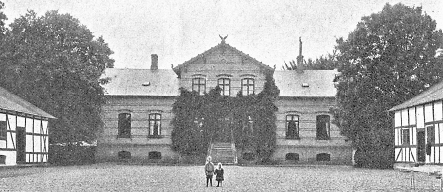 Torpegård er en gammel hovedgård, som nævnes første gang i 1471. Gården ligger i Sønder Nærå Sogn, Åsum Herred, Årslev Kommune. Hovedbygningen er opført i 1864.